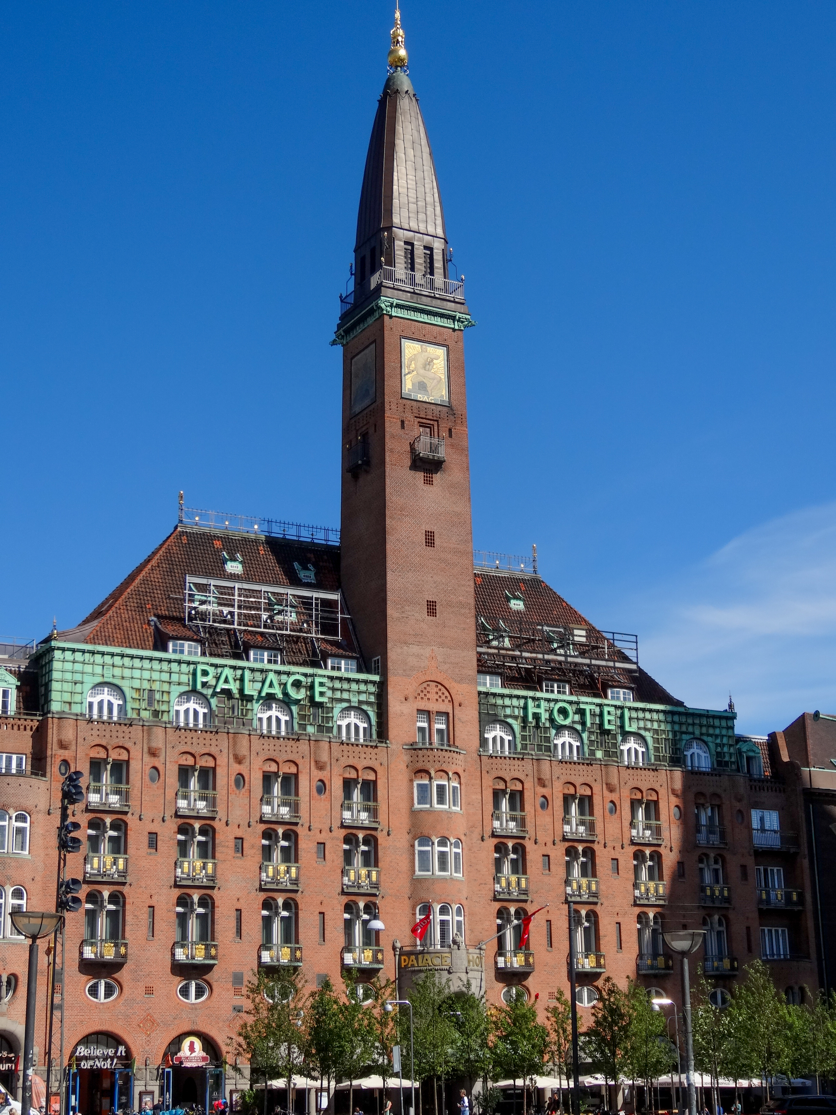 Palace Hotel in Copenhagen, Denmark